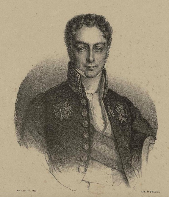 Jean-Baptiste Gay, vicomte de Martignac